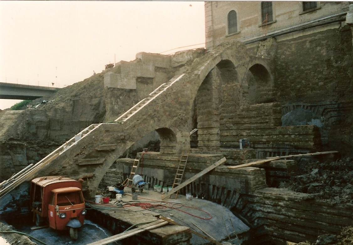 la struttura della Botte Napoleonica, che evidenzia la scala idrometrica .